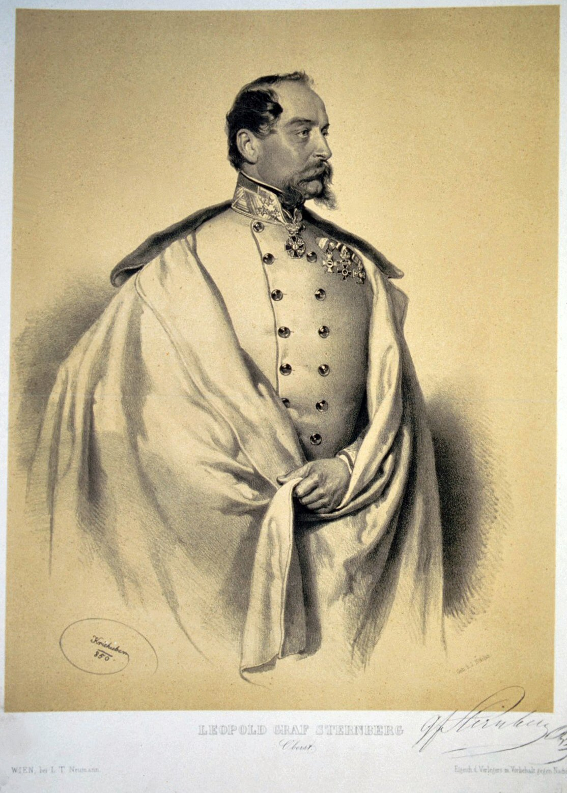 Leopold Graf Sternberg (1811-1899), General der Kavallerie, Ritter des Maria-Theresien-Orden, Geheimrat